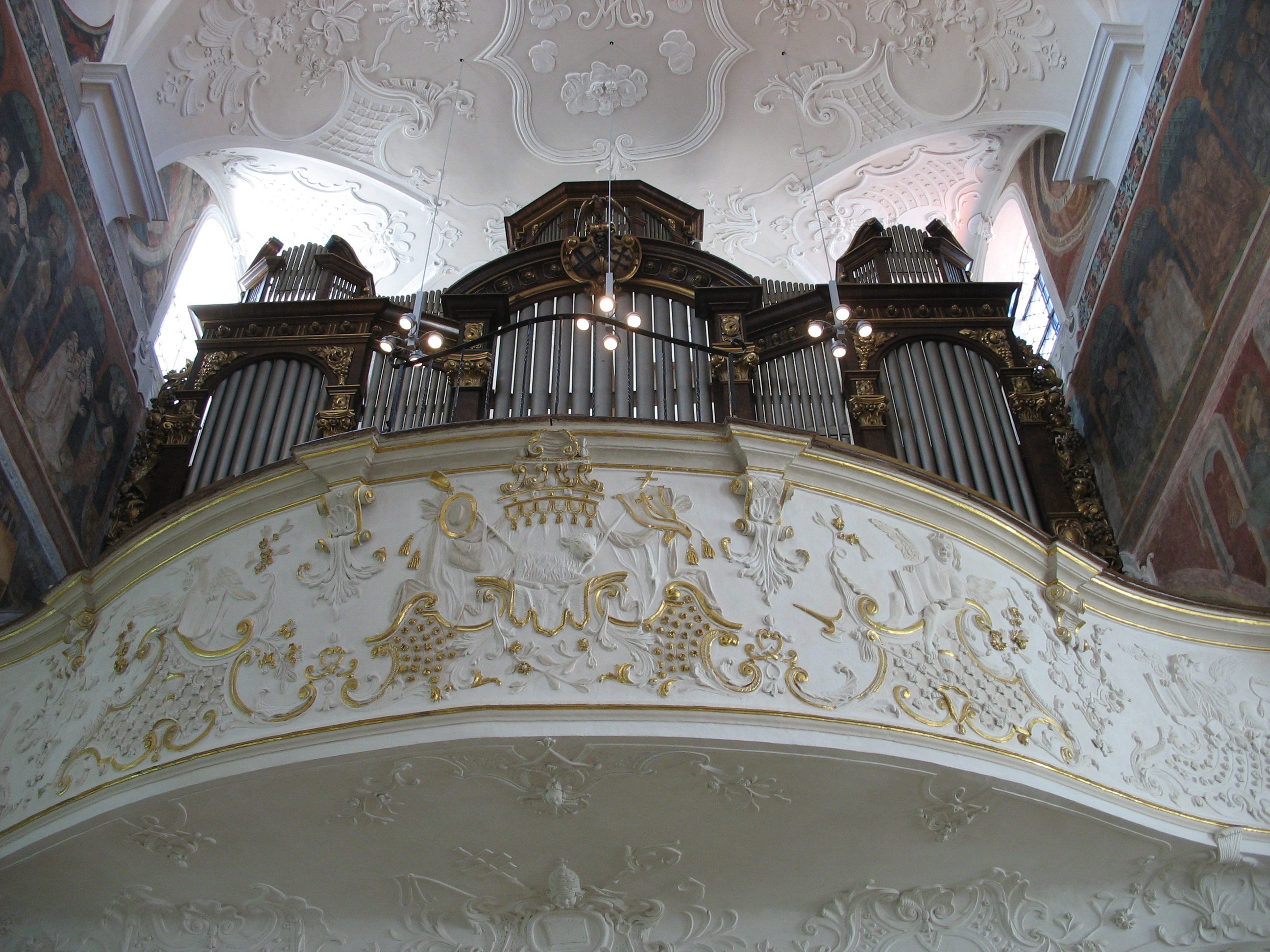 Konstanz, Dreifaltigkeitskirche, Orgelempore